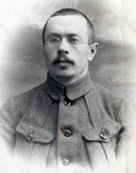 Шахрай Василь Матвійович